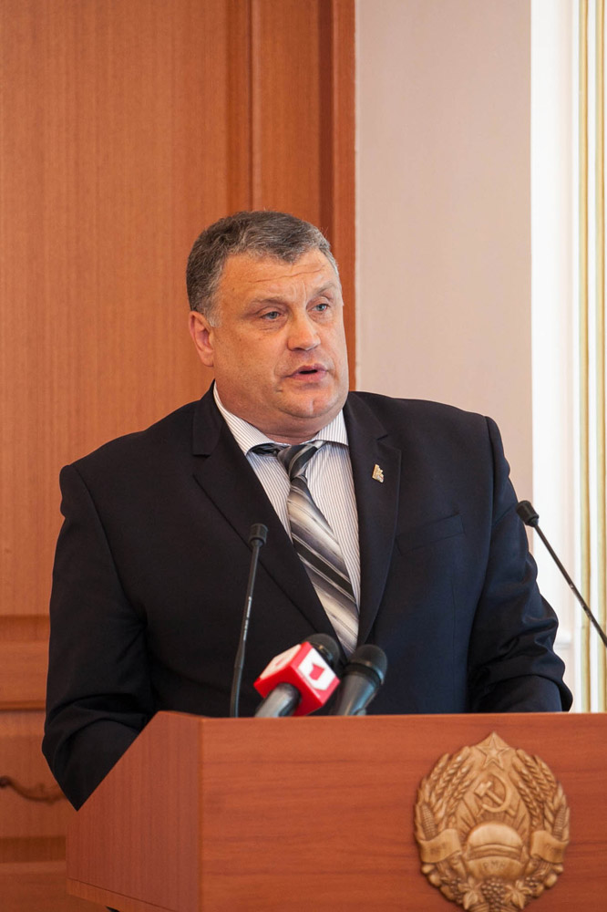 Андрей Иванович Безбабченко - Глава государственной администрации города Тирасполь